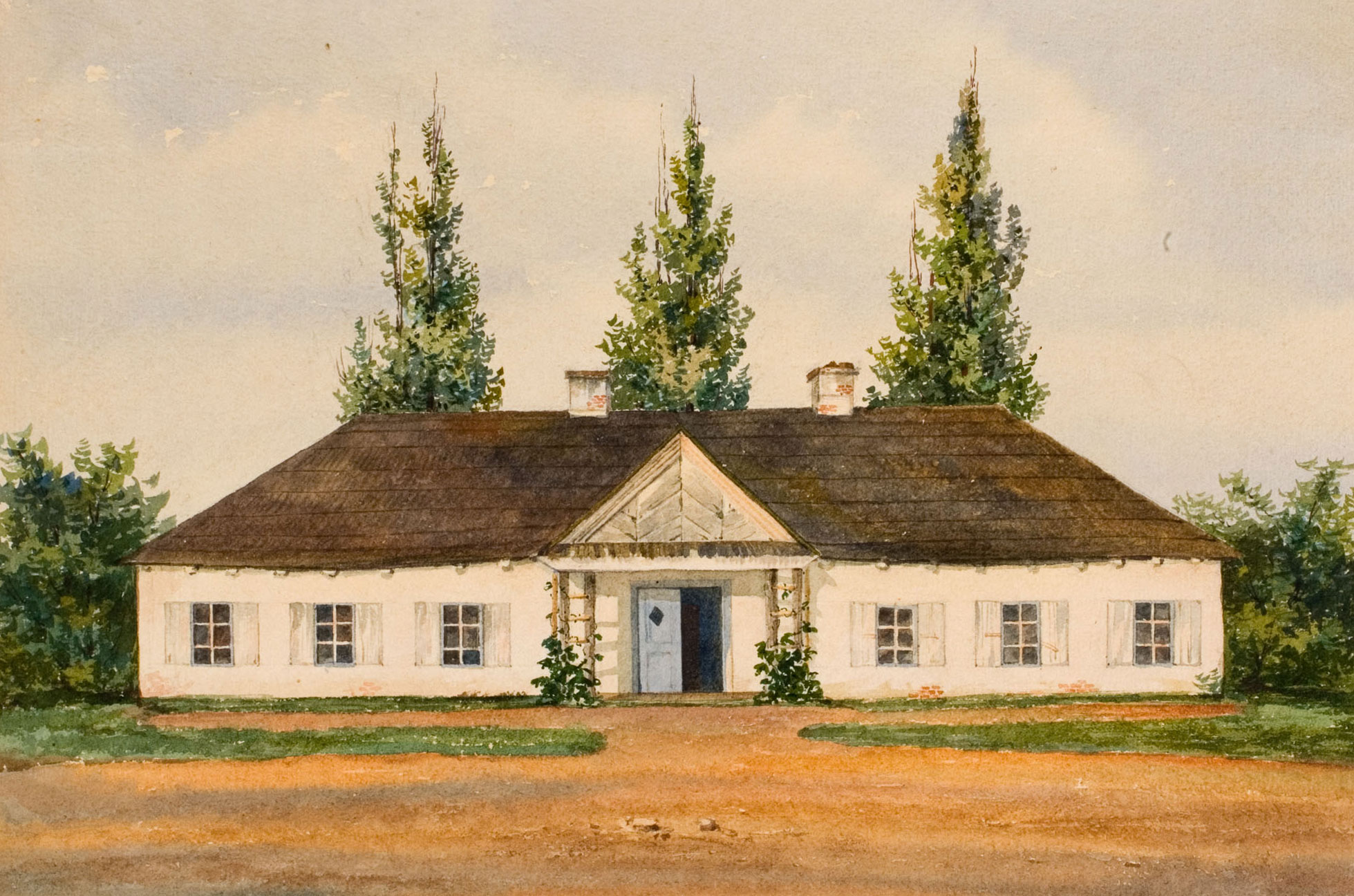 Беларуская (тарашкевіца): Кобрынь (Kobryń), вуліца Губэрніяльная (vulica Gubernijalnaja). Меская сядзіба Губэрня (Gubernia)